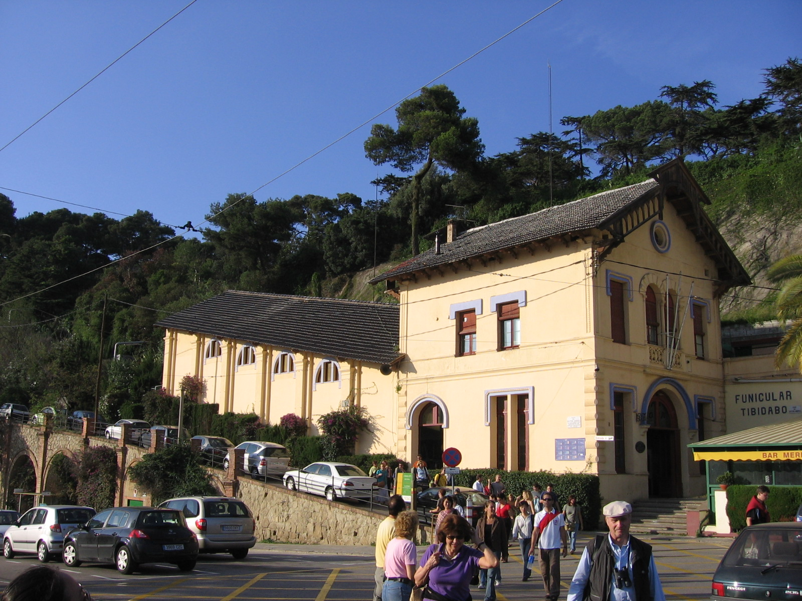 Funicular del Tibidabo, Barcelona, lower station/estació inferior (Plaça Dr. Andreu)